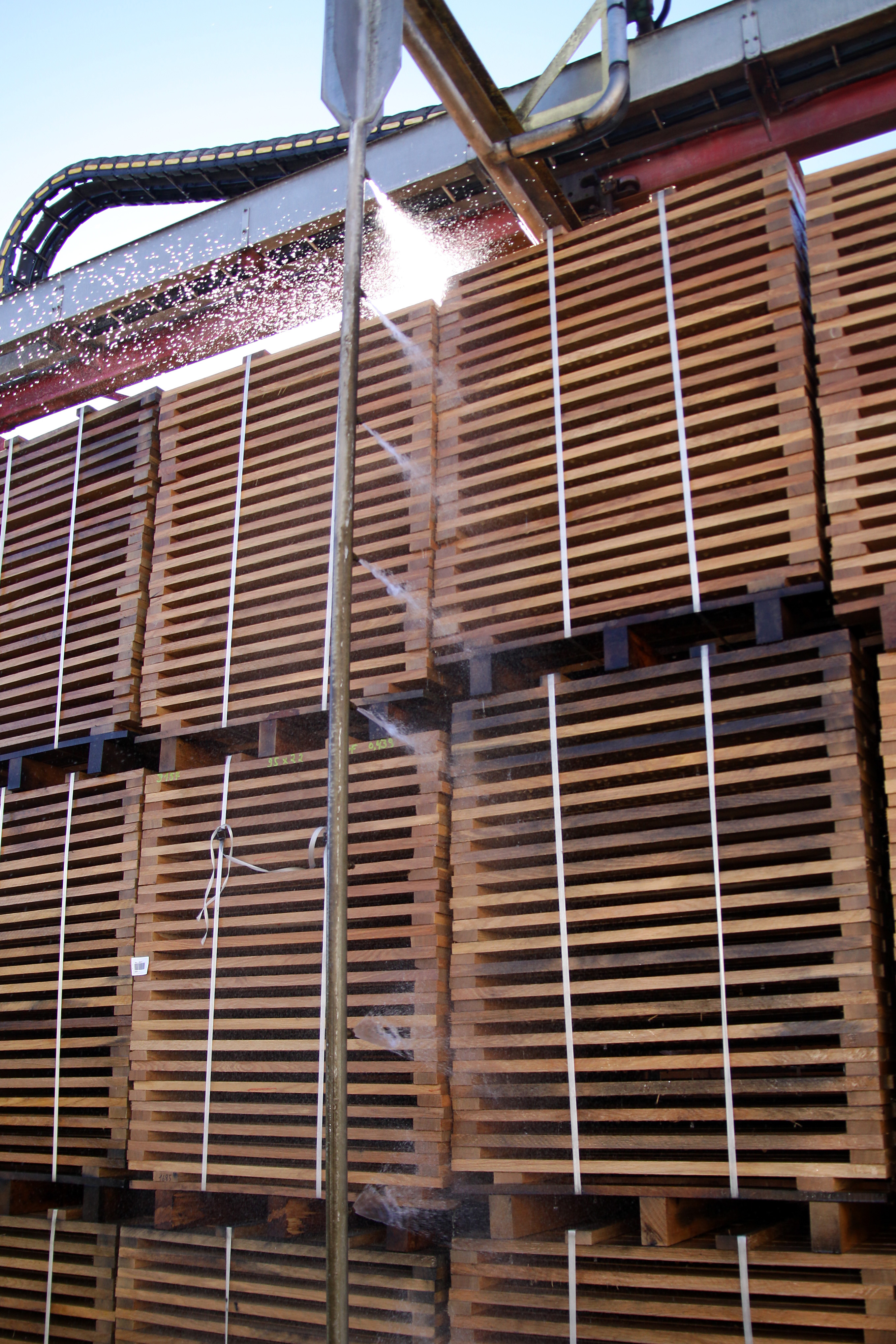 Arrosage automatique des merrains, pour les laver de leurs tanins, pour la production de tonneaux